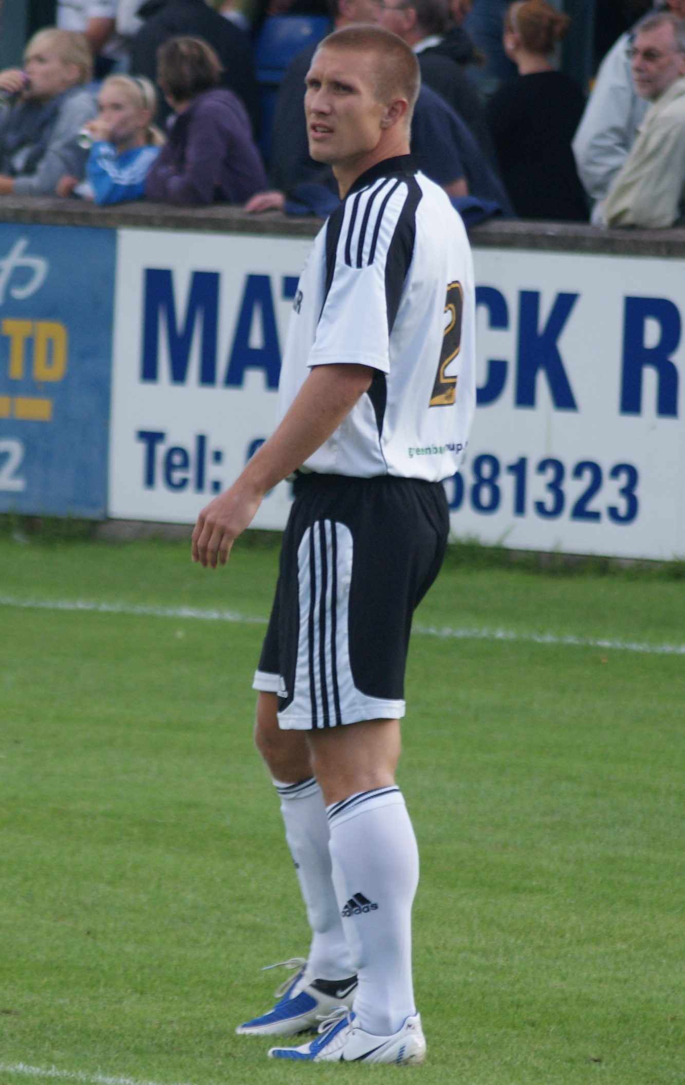 Martin Albrechtson